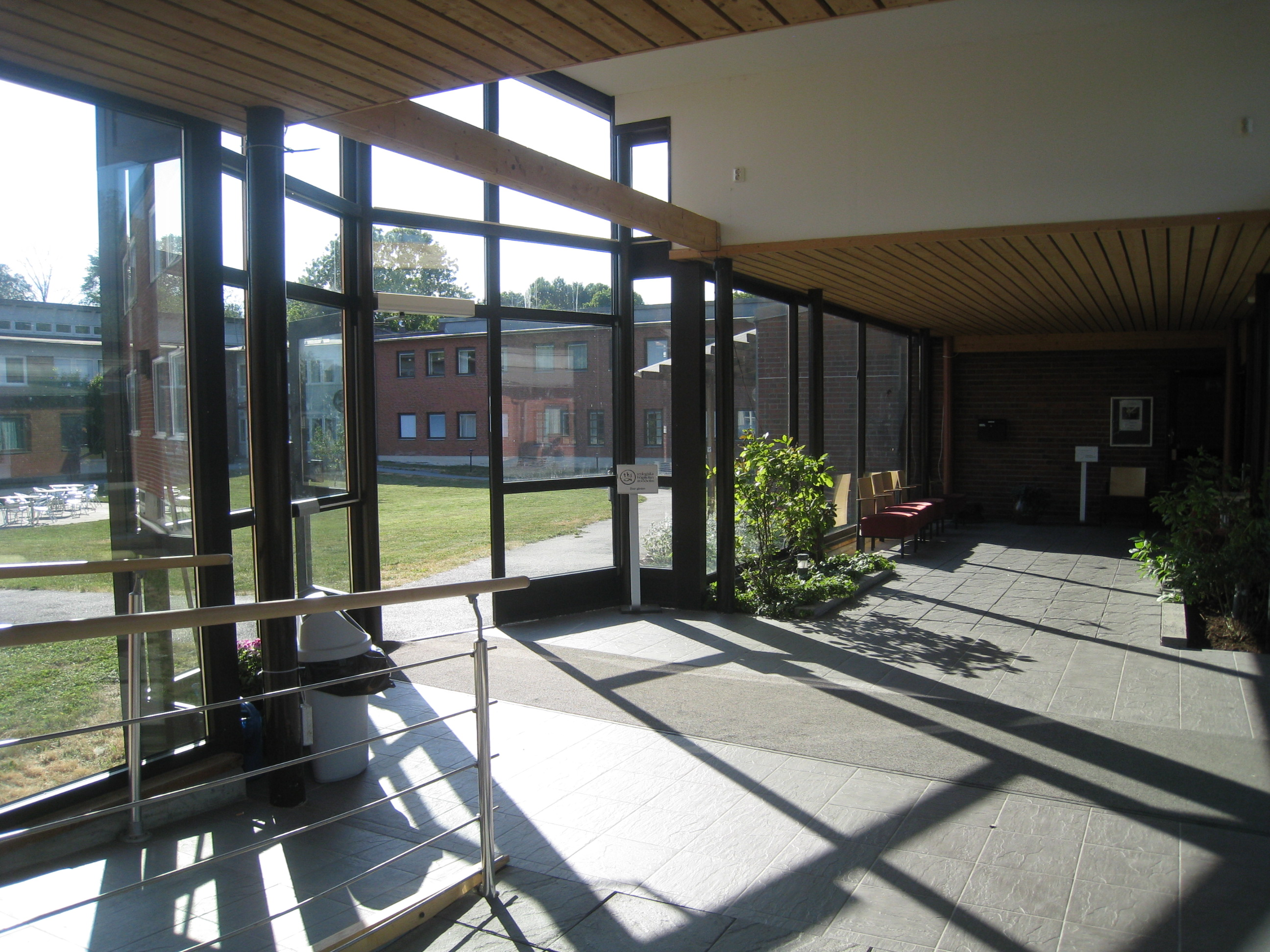 Interiör i Teologiska högskolan Stockholm, Campus Bromma, Åkeshovsvägen 29, Nockebyhov, Bromma, Stockholm.